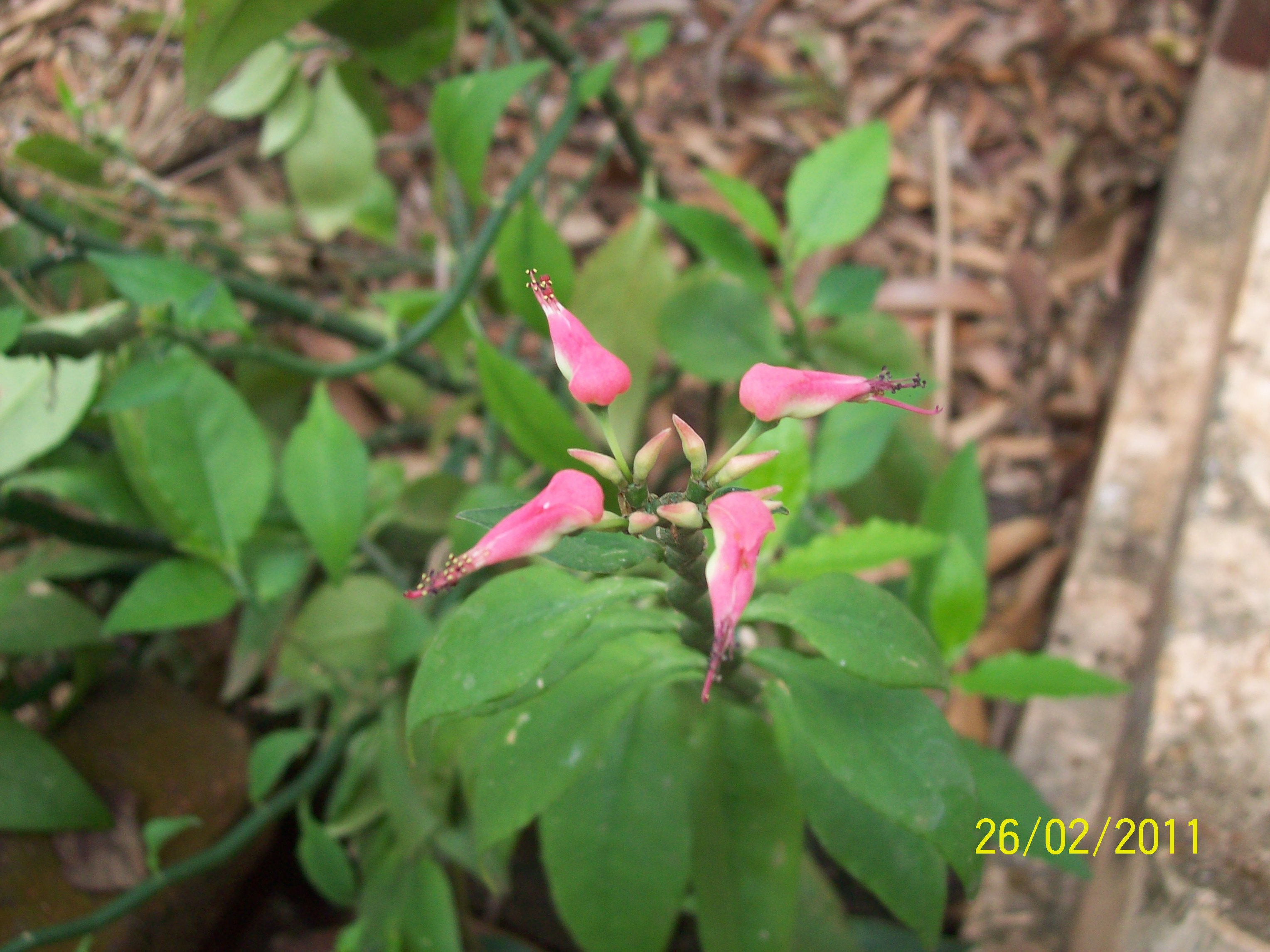 തത്തമ്മച്ചെടി: സാധാരണ നാട്ടിൻപുറങ്ങളിൽ കണ്ടുവരുന്ന ഒരു കുറ്റിച്ചെടിയാണിത്. തത്തയുടെ രൂപത്തോട് സാദൃശ്യമുള്ള പൂവുകളാണ് ഇതിന്റെ പ്രധാന ആകർഷണം. ഉദ്യാനസസ്യമായും നട്ടുവളർത്തുന്ന ഈ ചെടിയുടെ പല തരം ഉപജാതികളായി ഉണ്ട്. ശാസ്ത്രനാമം:Pedilanthus tithymaloides. പ്രാദേശികമായി ഇത് പല പേരുകളിലും അറിയപ്പെടുന്നു